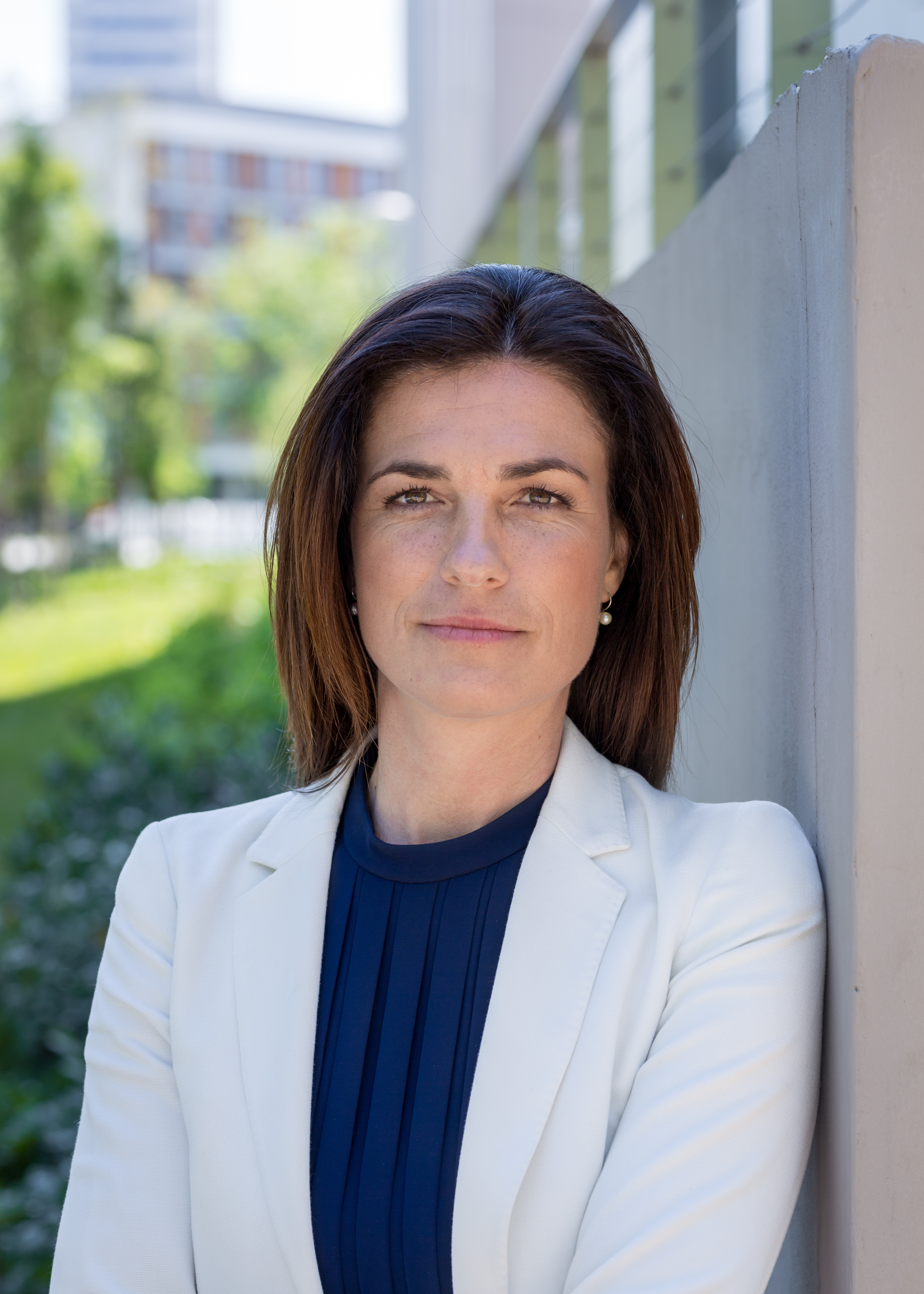 Varga Judit a Ludovica Campuson